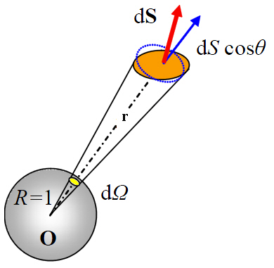 Ángulo sólido (esquema)